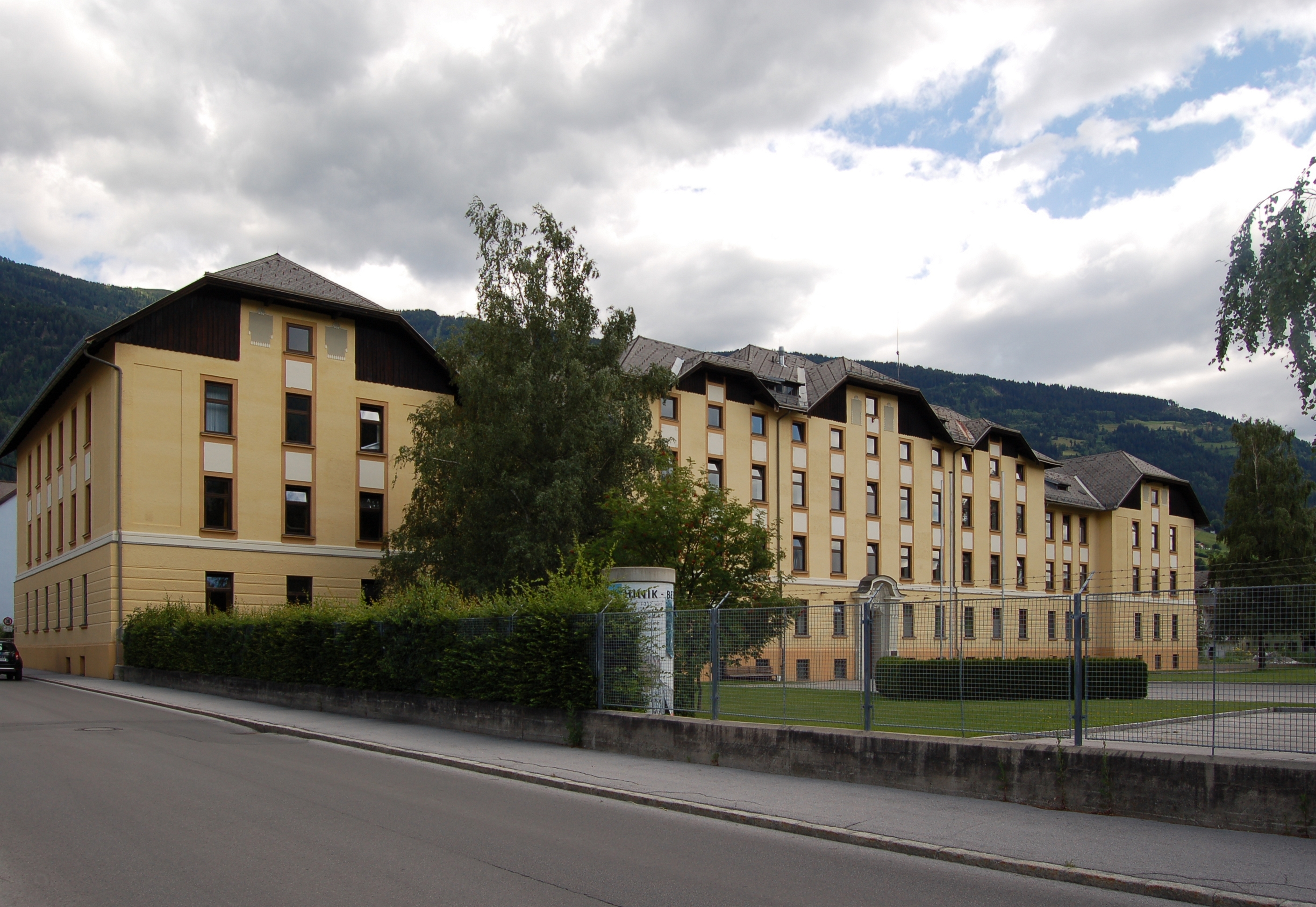 Das denkmalgeschützte Büro-, Mannschafts- und Wirtschaftsgebäude der Franz-Josef-Kaserne Lienz ist ein langgestrecktes, viergeschoßiges Gebäude mit überhöhtem, dreiteiligem Mitelrisalit an den Längsseiten und wurde zwischen 1910 und 1911 errichtet. Nordseitig wurden jeweils übereckgeführte, nordseitige Seitentrakte angefügt, das Eingangsportal mit geschwungenem Giebel und Wappen von Kaiser Franz Josef ist pilastergerahmt. Der Fassadendekor erfolgte im Erdgeschoß genutet, die Obergeschoße wurden durch Dekorplatten vertikal unterteilt.